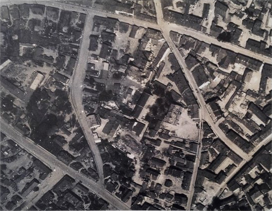 Тэрыторыя Мінскага хлебазавода на аэрафотаздымку 1941 г